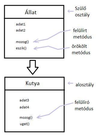 illusztráció